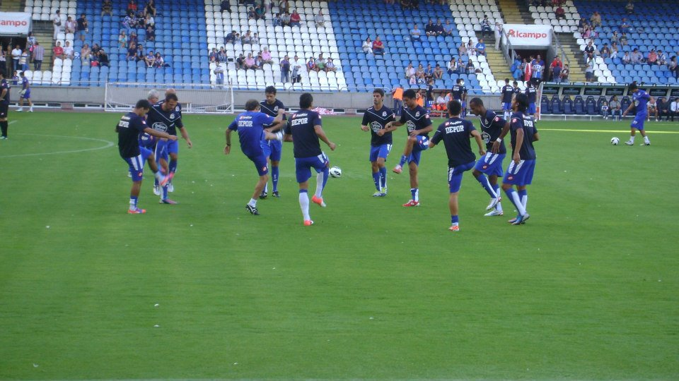 Jugadores del Deportivo de La Coruña. Temporada 2012/13.